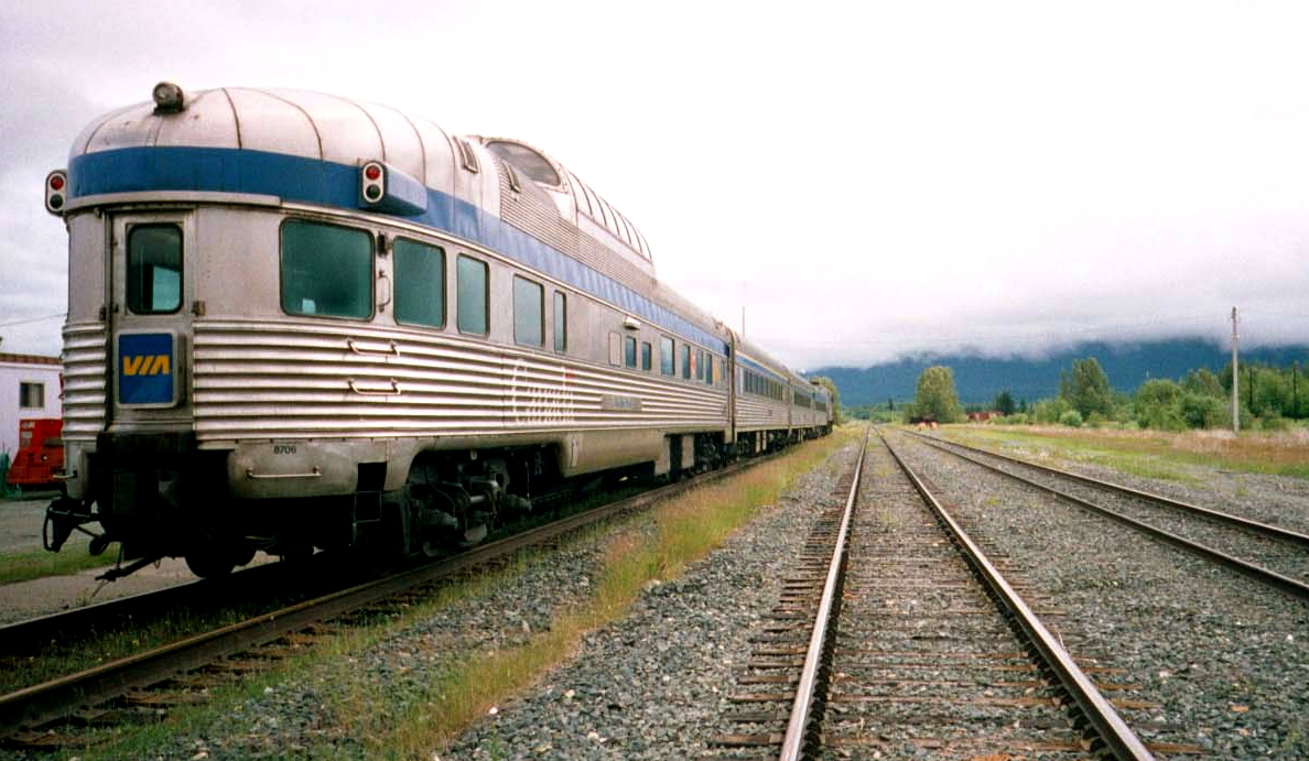 in mcbride b.c. en route to jasper